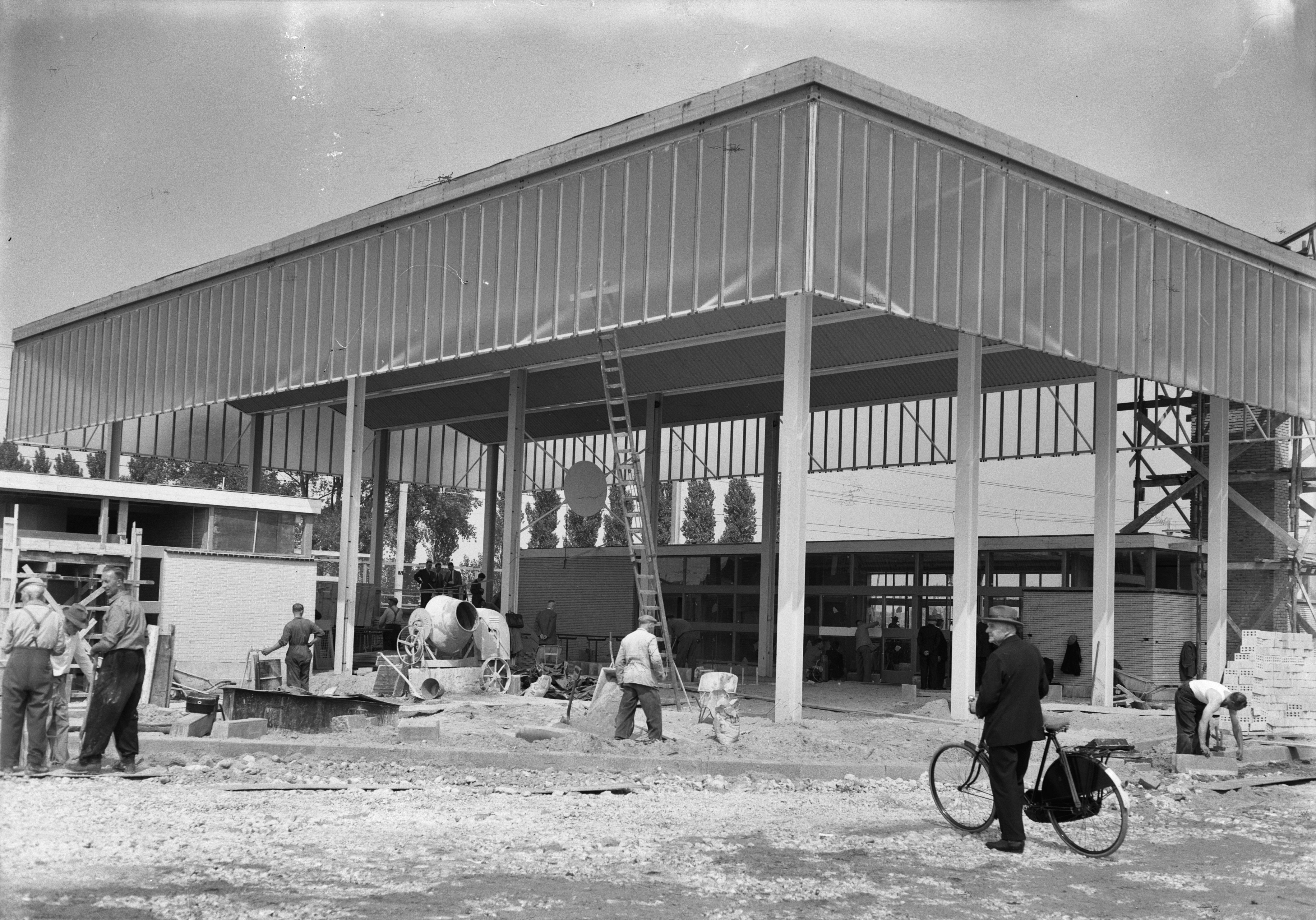 Collectie / Archief : Fotocollectie Anefo Reportage / Serie : [ onbekend ] Beschrijving : Aanbouw Station Sloterdijk. Buitenaanzicht Datum : 24 mei 1956 Trefwoorden : STATIONS, aanbouw Fotograaf : Rossem, Wim van / Anefo Auteursrechthebbende : Nationaal Archief Materiaalsoort : Negatief (zwart/wit) Nummer archiefinventaris : bekijk toegang 2.24.01.04 Bestanddeelnummer : 907-7789 Reacties Geplaatst door Maaike op 21 juli 2013 - 18:14. NS station Sloterdijk Plaats: Amsterdam; Noord-Holland